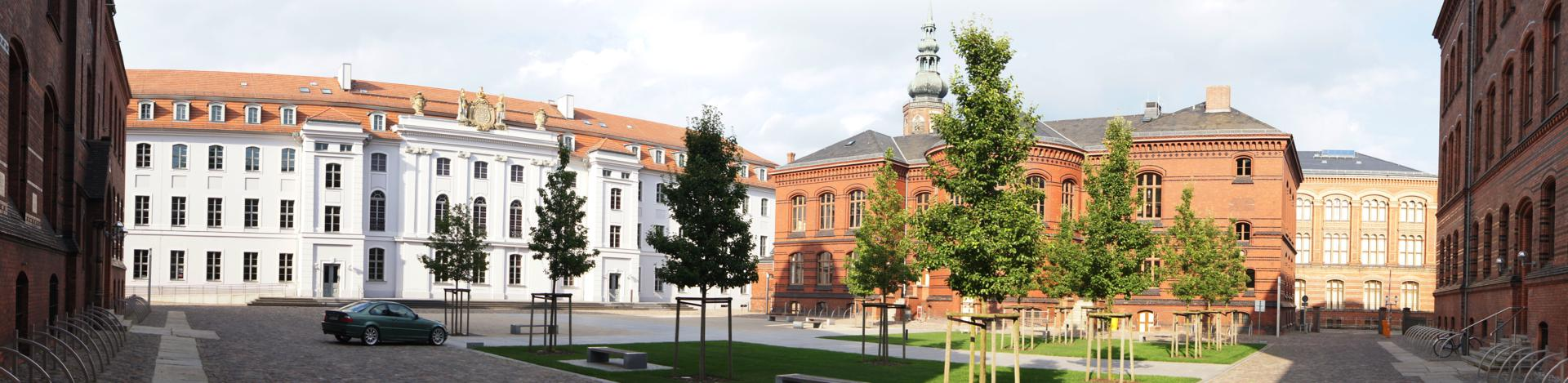 Alter Campus Uni Greifswald